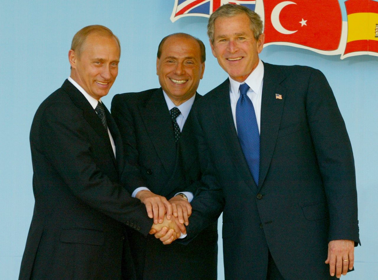 ПРАТИКА-ДИ-МАРЕ (база ВВС Италии). С Председателем Совета министров Италии Сильвио Берлускони и Президентом США Джорджем Бушем после подписания Римской декларации.